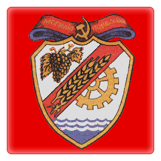 Могилів-Подільський за радянських часів. Mohyliv-Podilsky soviet COA